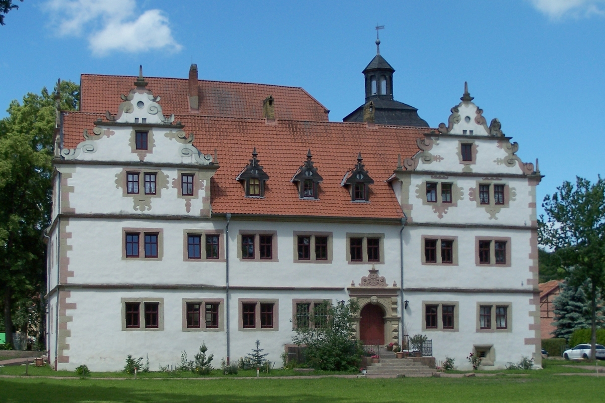 Schloss Wildprechtroda - Ansicht von Osten